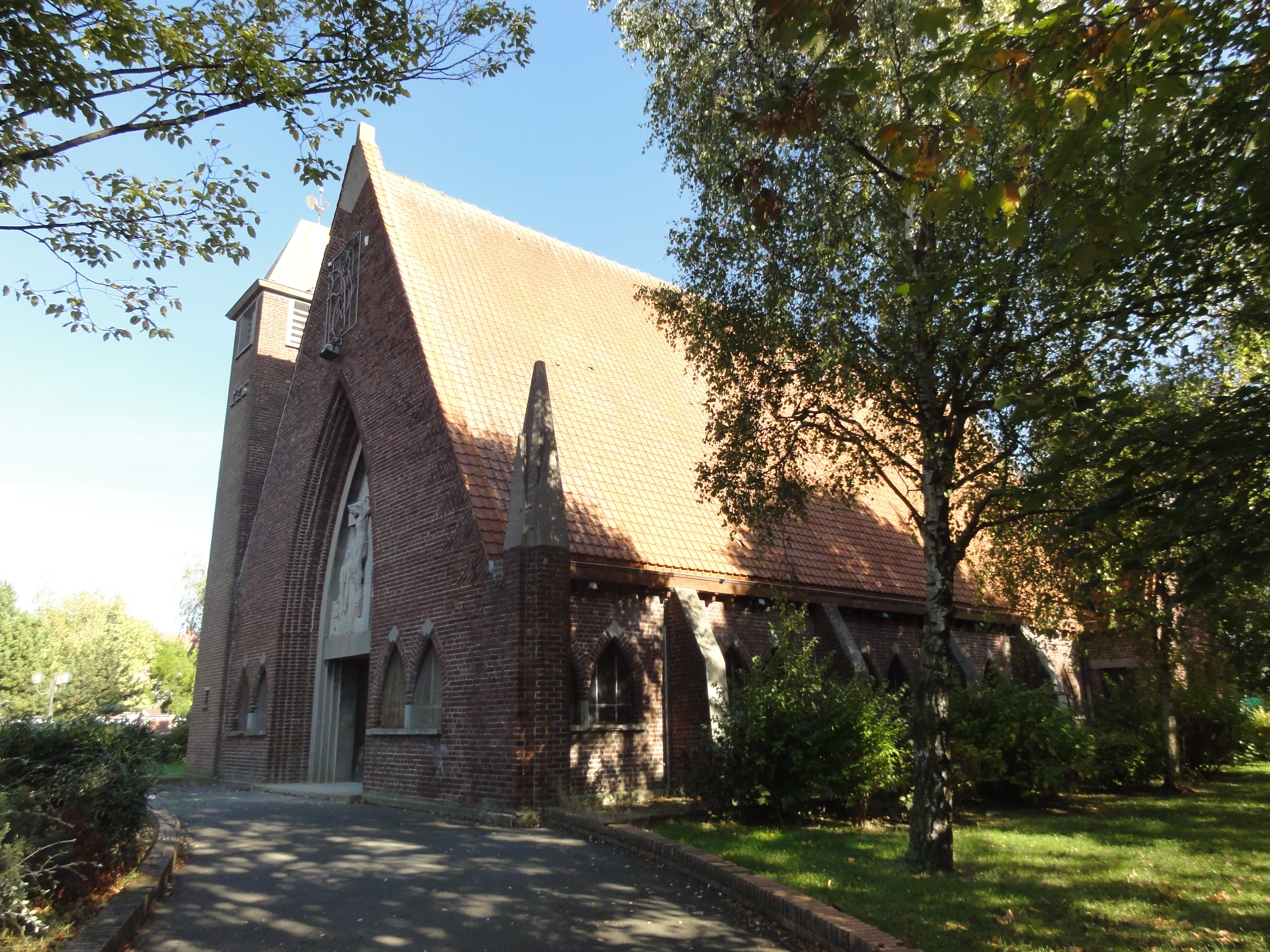 Église Sainte-Barbe des cités de la Fosse n° 1 de la Compagnie des mines de Drocourt, Drocourt, Pas-de-Calais, Nord-Pas-de-Calais, France.